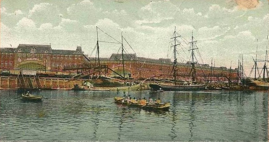 Vista del Mercado Central de Frutos de Buenos Aires, en Avellaneda, desde la Ribera Norte del Riachuelo, barrio de La Boca. Edificio demolido en 1962, actual sitio de las Torres Pueyrredón.